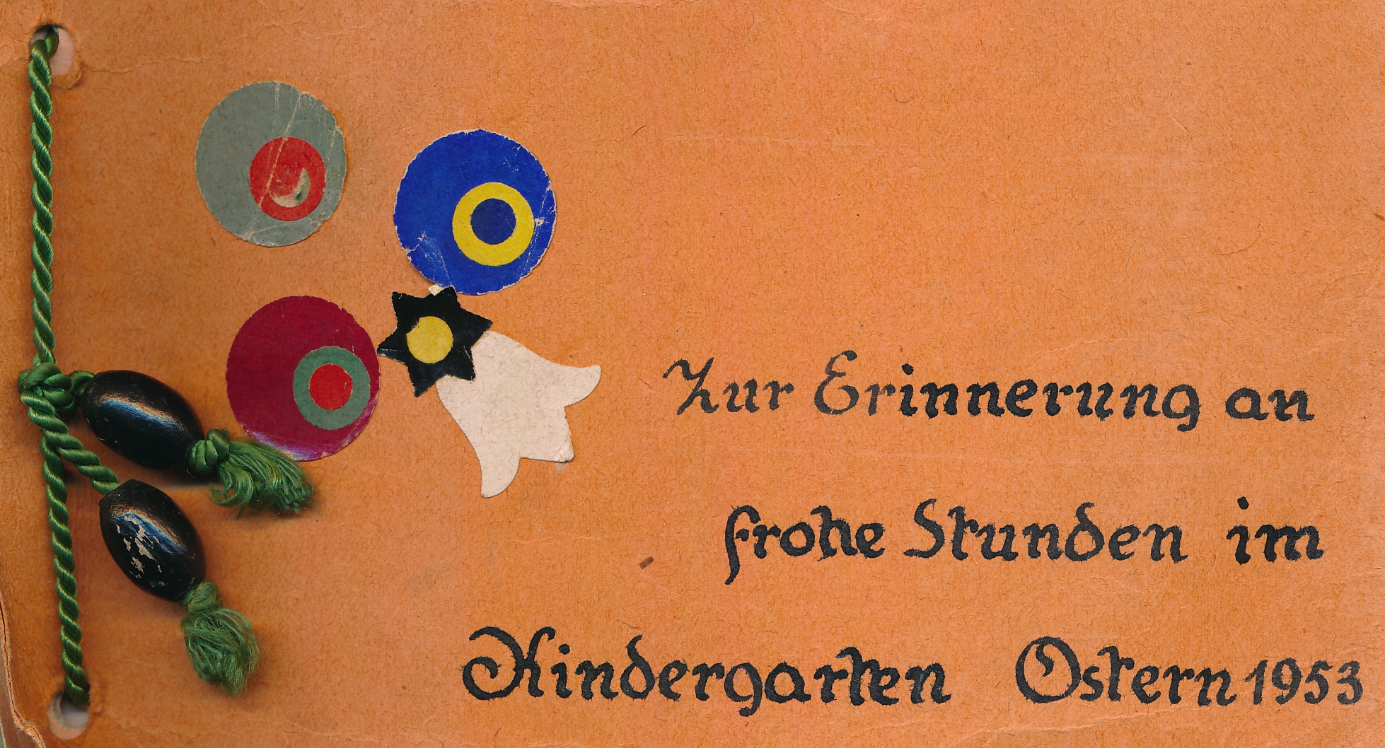 Von den Kindern mitgestaltetes Kindergarten-Entlassungsbuch.